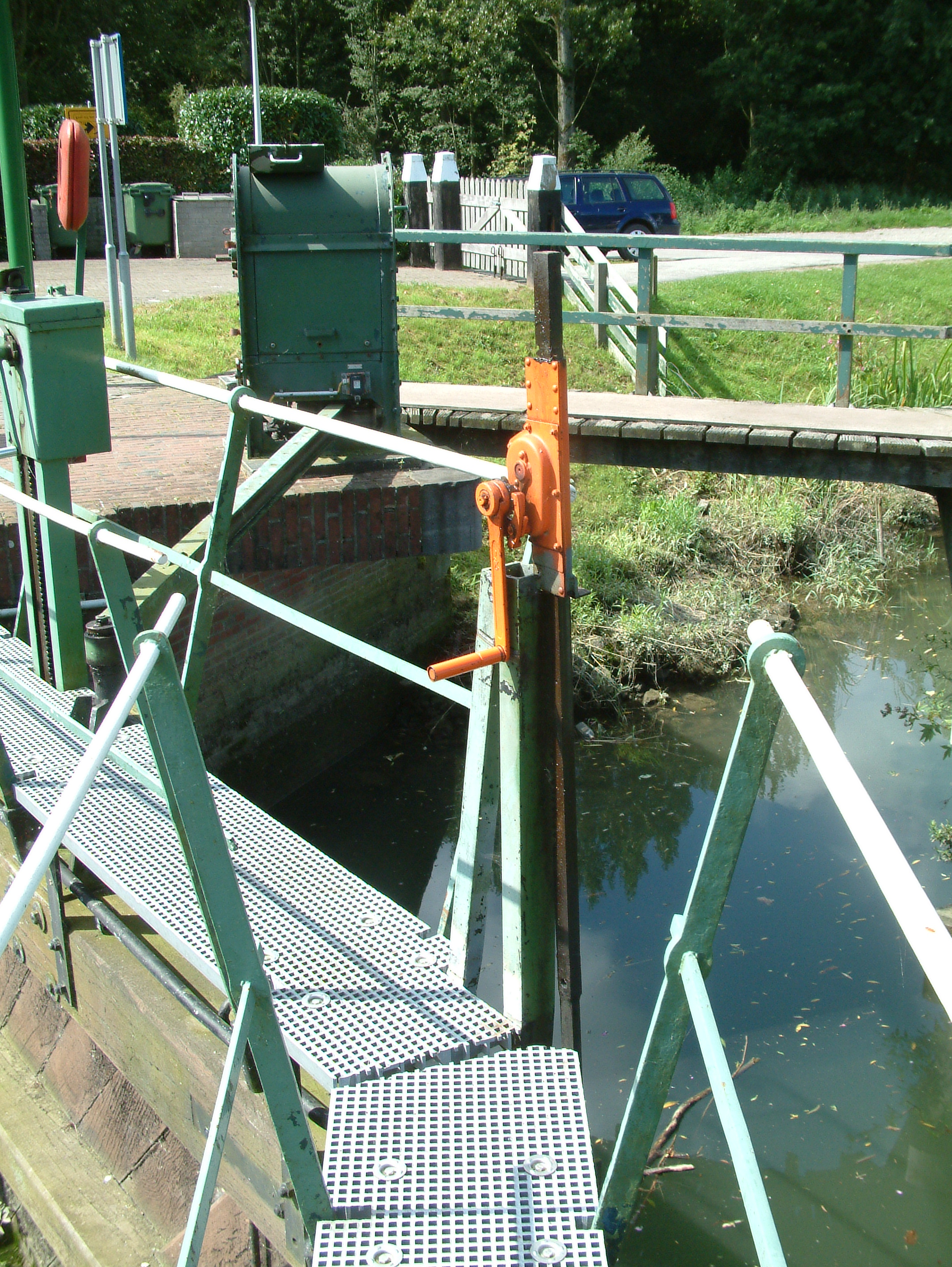 De Helsluis tusssen de Beneden Merwede tegenover Sliedrecht en de Helsloot